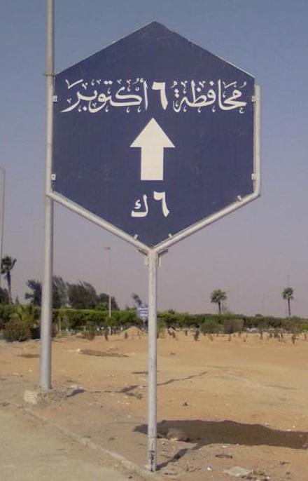 مدخل مدينة السادس من اكتوبر